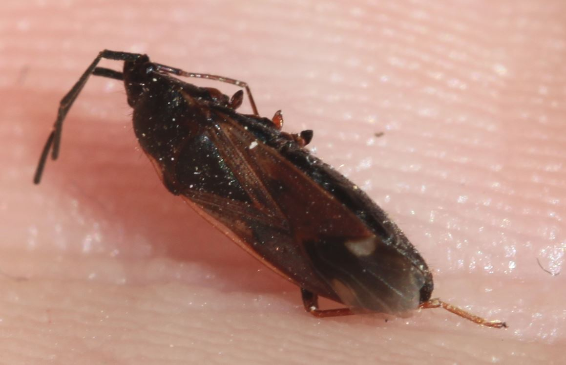 Bodenwanze Eremocoris fenestratus am 28. Juni 2019 an der Côte d’Azur